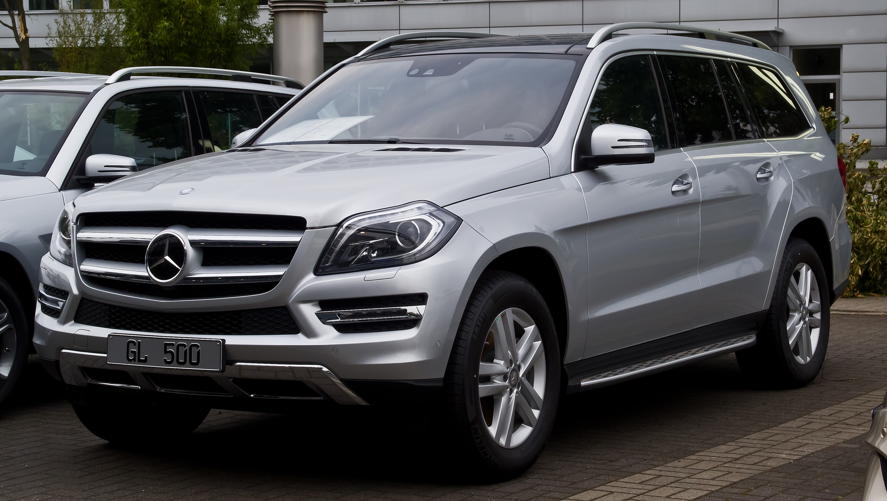 Mercedes-Benz GL 500 4MATIC (X 166)